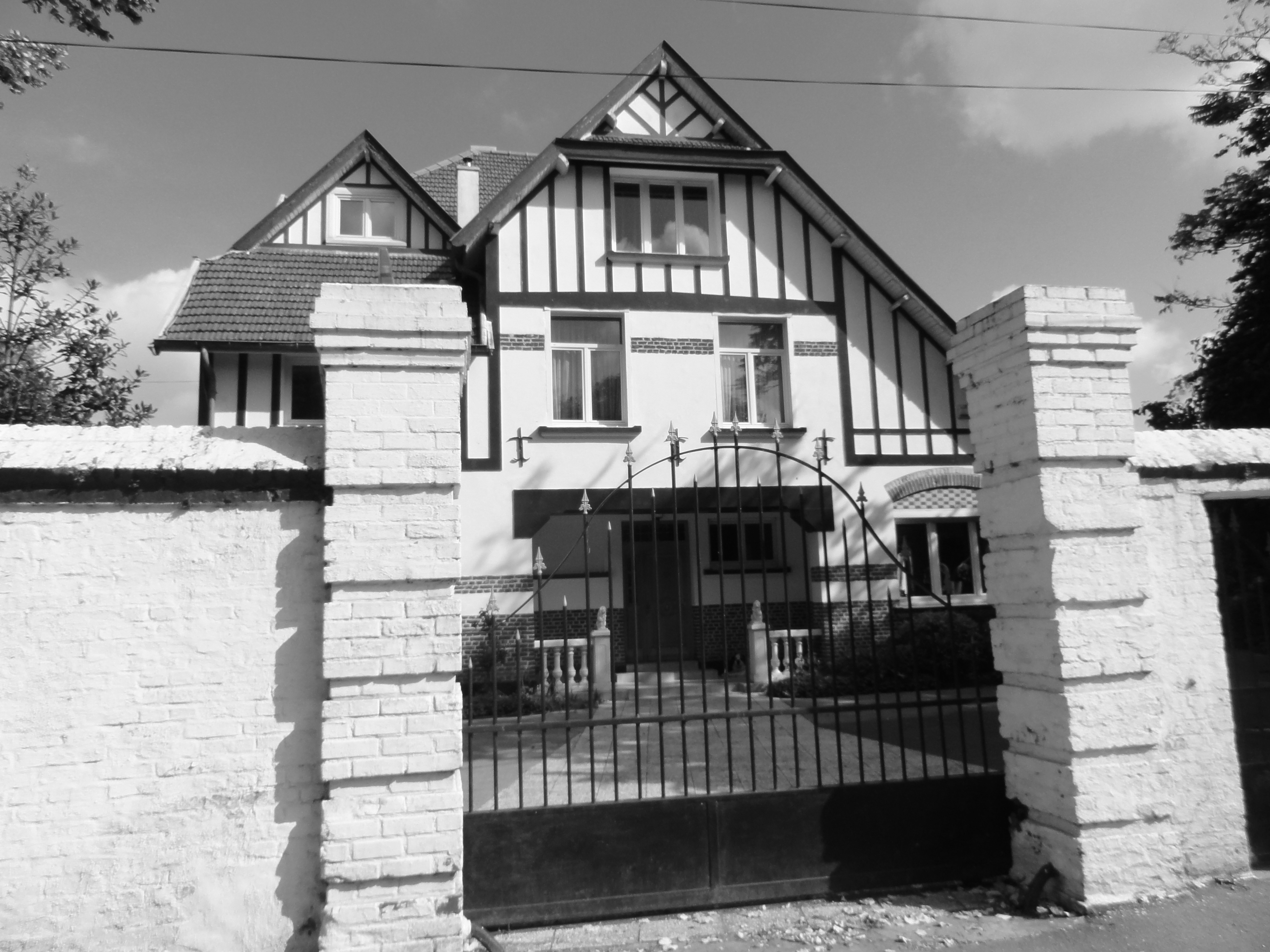 Cités de la Fosse n° 3 de la Compagnie des mines de Béthune, Vermelles et Mazingarbe, Pas-de-Calais, Nord-Pas-de-Calais, France.